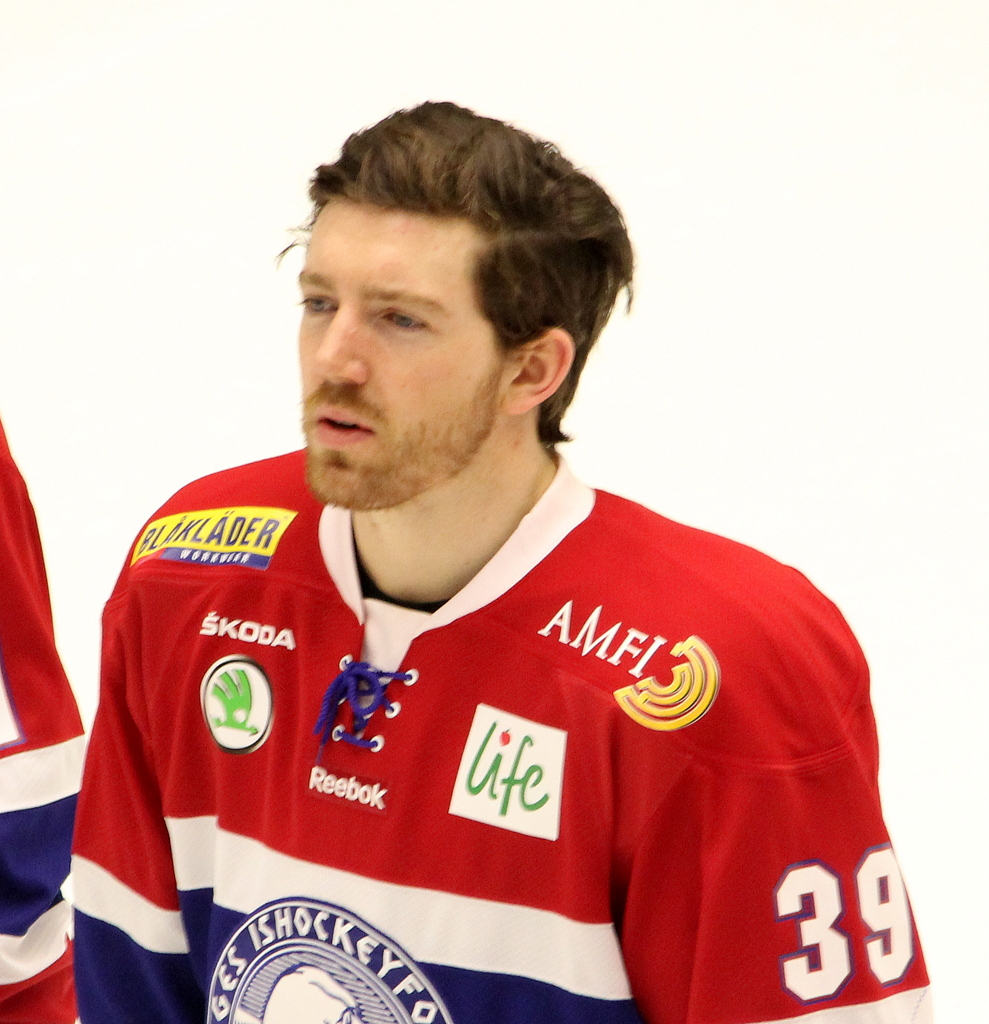 Henrik Solberg i DNB arena i forbindelse med landskamp Norge- Russland 20.april. 2013